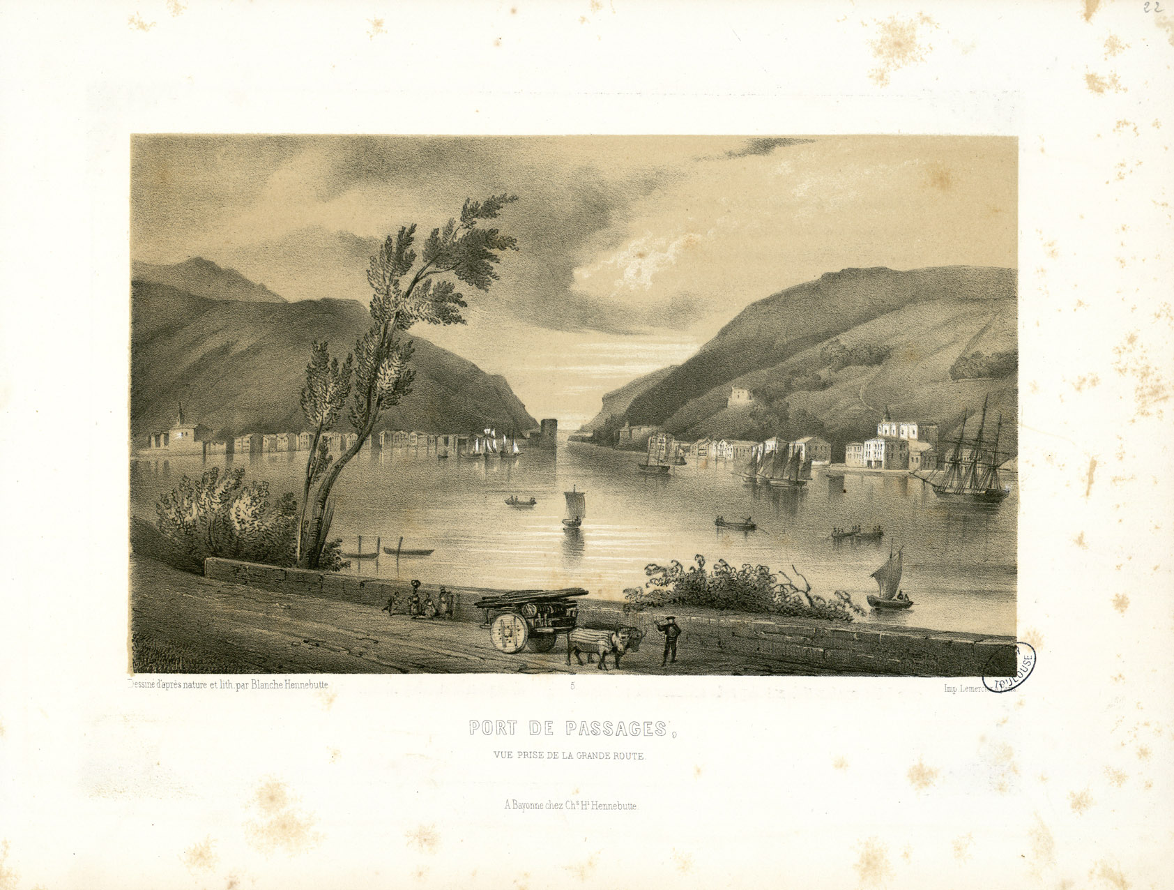 Fait partie d'un album de lithographies en deux parties : France (pl. 1 à 17) et Espagne (pl. 18 à 28). 2 pl. en frontispice et un Plan de la Côte de Biarrits (i.e. Biarritz) Faux titre : Description des environs de Bayonne et de Saint Sébastien Pièce jointe : lettre datée du 24 octobre 1928; papier à lettres avec en-tête au nom du Musée Social de Paris. Ancely, René (1876 - 1966). Possesseur